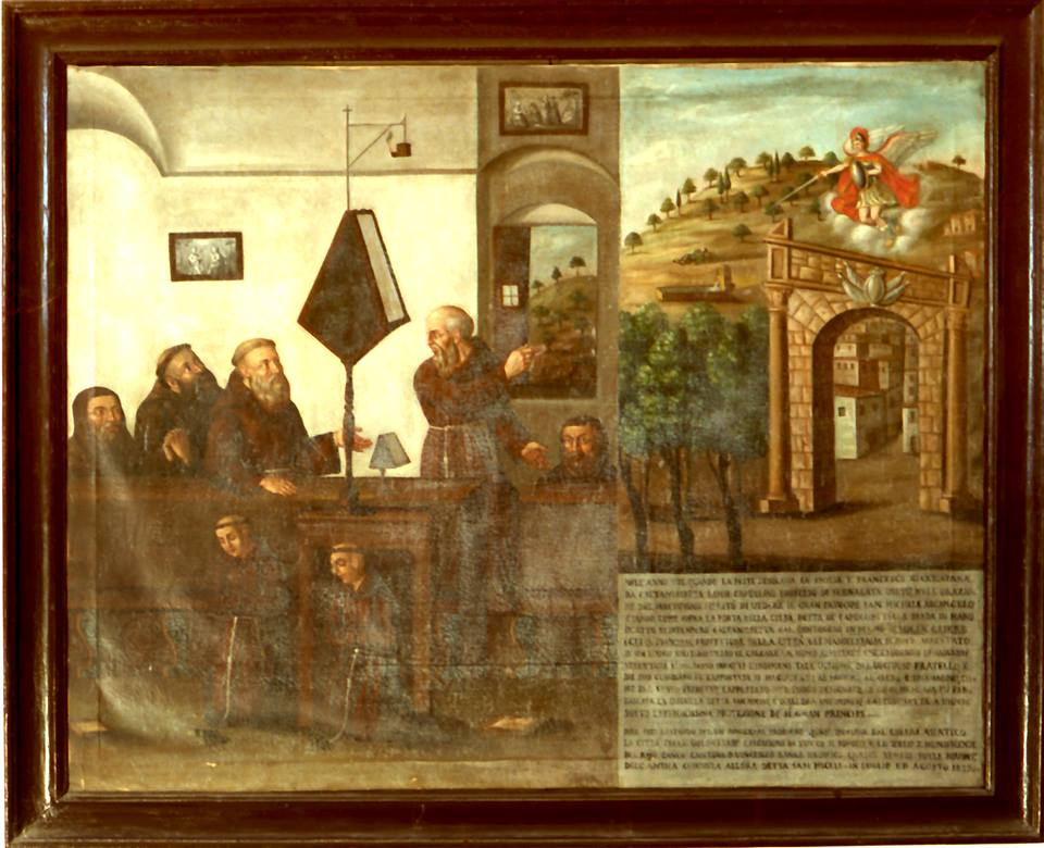 Il quadro è conservato nel convento dei Cappuccini a S. Michele dove è illustrata l’apparizione di S. Michele a fra Giarratana nel 1625. L'immagine mostra l'apparizione di San Michele, con in primo piano la porta dei Cappuccini sita in contrada Pigni-Rinella e sullo sfondo la collina di contrada Sallemi con l'abbeveratoio, poco più in alto il corpo dell'appestato, dove verrà eretta la cappelletta dedicata al santo che poi da origine alla chiesa attuale di San Michele.